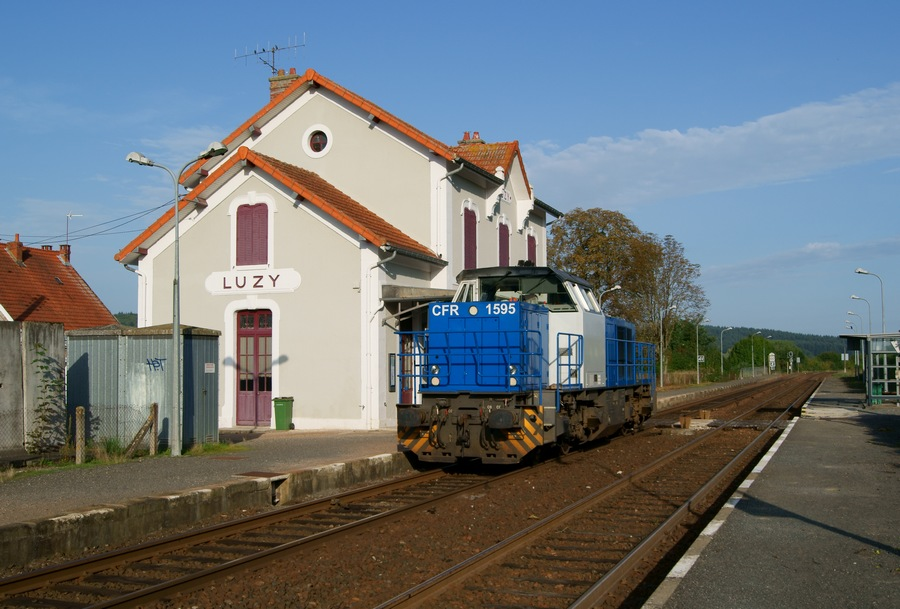 La gare de Luzy Nièvre